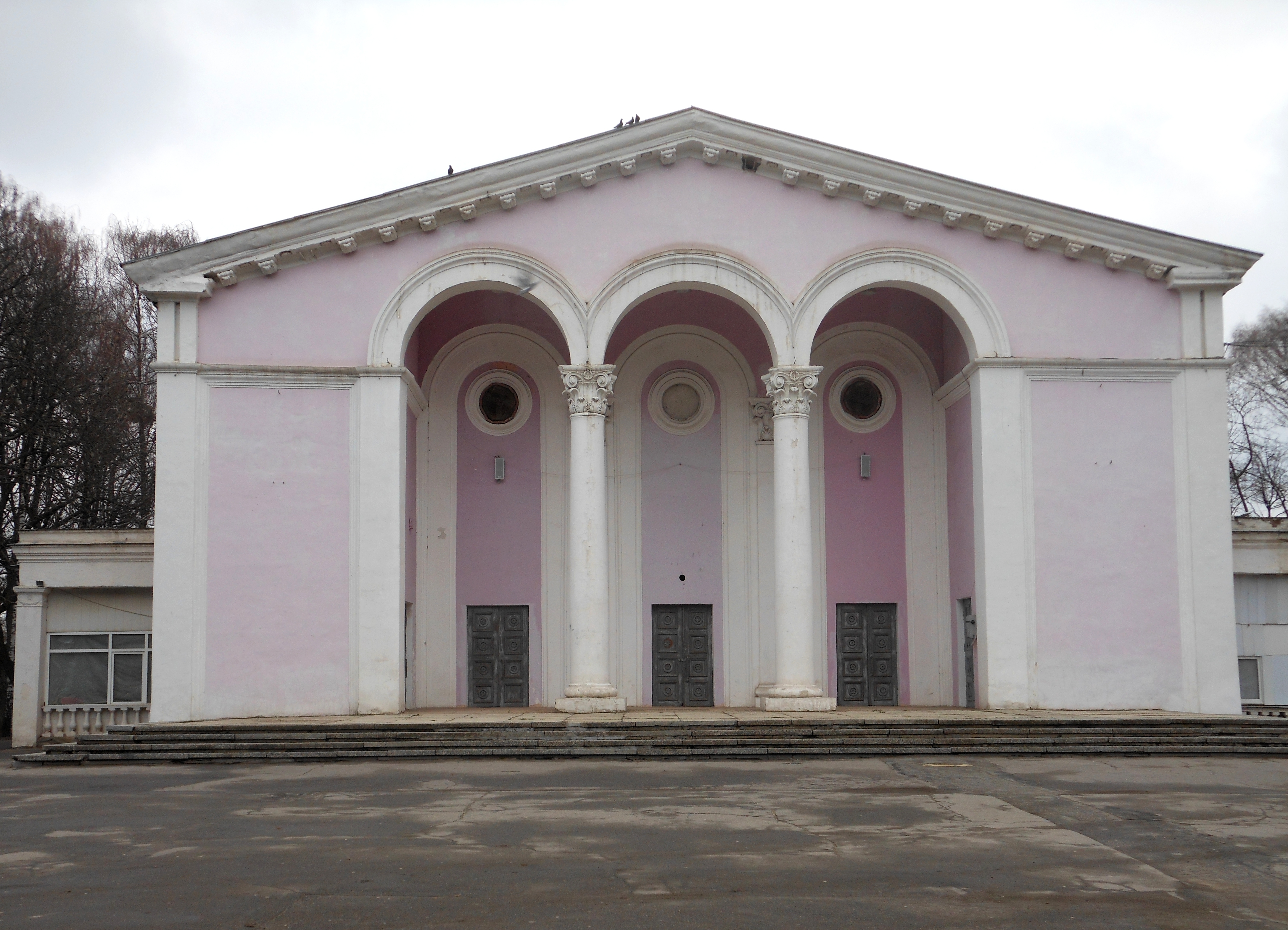 Літній театр, Вінниця, вул. Хлібна, 1